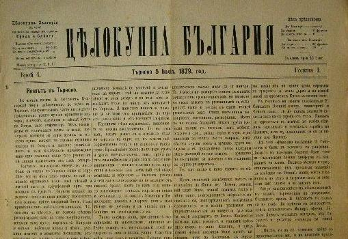 Вестник "Целокупна България", 5 юли 1879